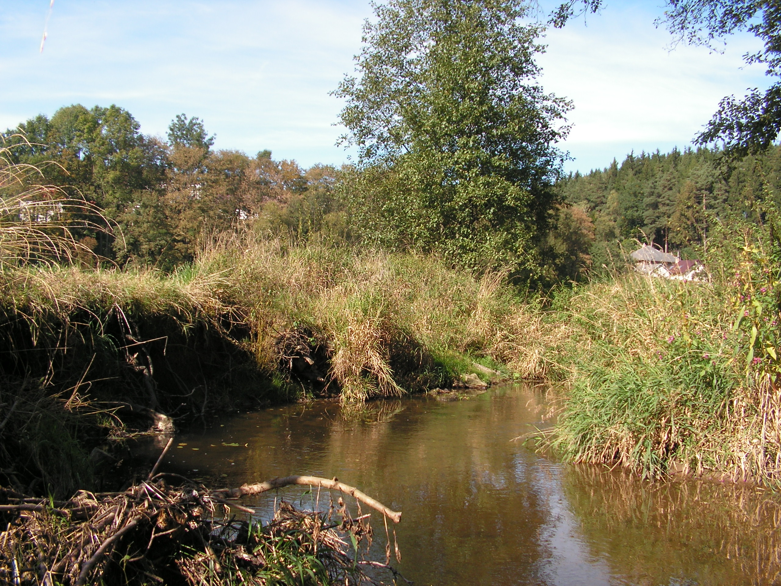 Borovský potok pod obcí Stříbrné Hory v okrese Havlíčkův Brod.